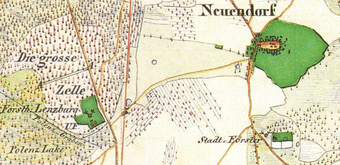 Wiesenhagen, vormals Neuendorf bei Trebbin, Stadt Trebbin, Brandenburg, Deutschland, Urmesstischblatt Blatt Woltersdorf 3845, von 1841